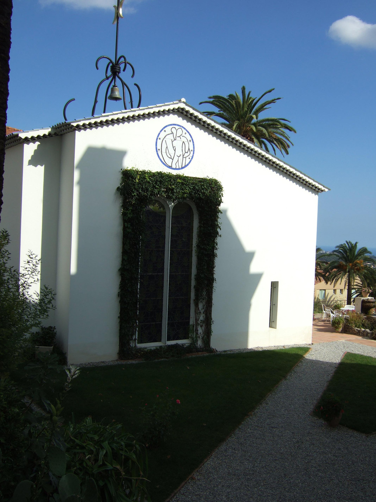 Entrata della cappella decorata da Matisse, a Vence.